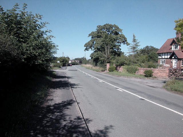 Ince Lane